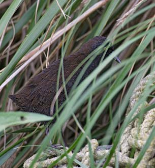 Atlantisia_rogersi russ.jpg